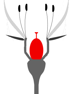 Posición del ovario súpera con hipanto. Flor perígina. Según Simpson (2005) Plant Systematics. Dibujado a partir de